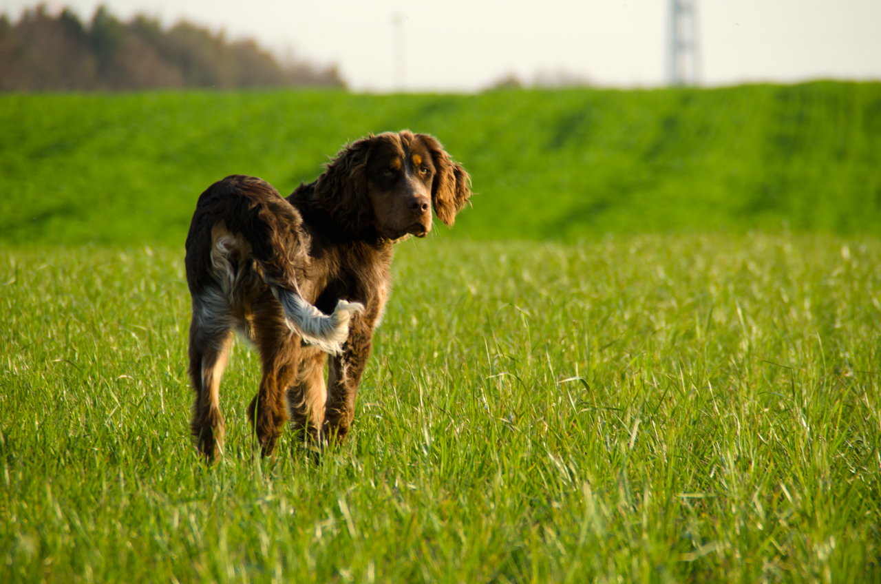 Notre épagneul picard, Gibbs des Chaumes de Thiérache à 6 mois